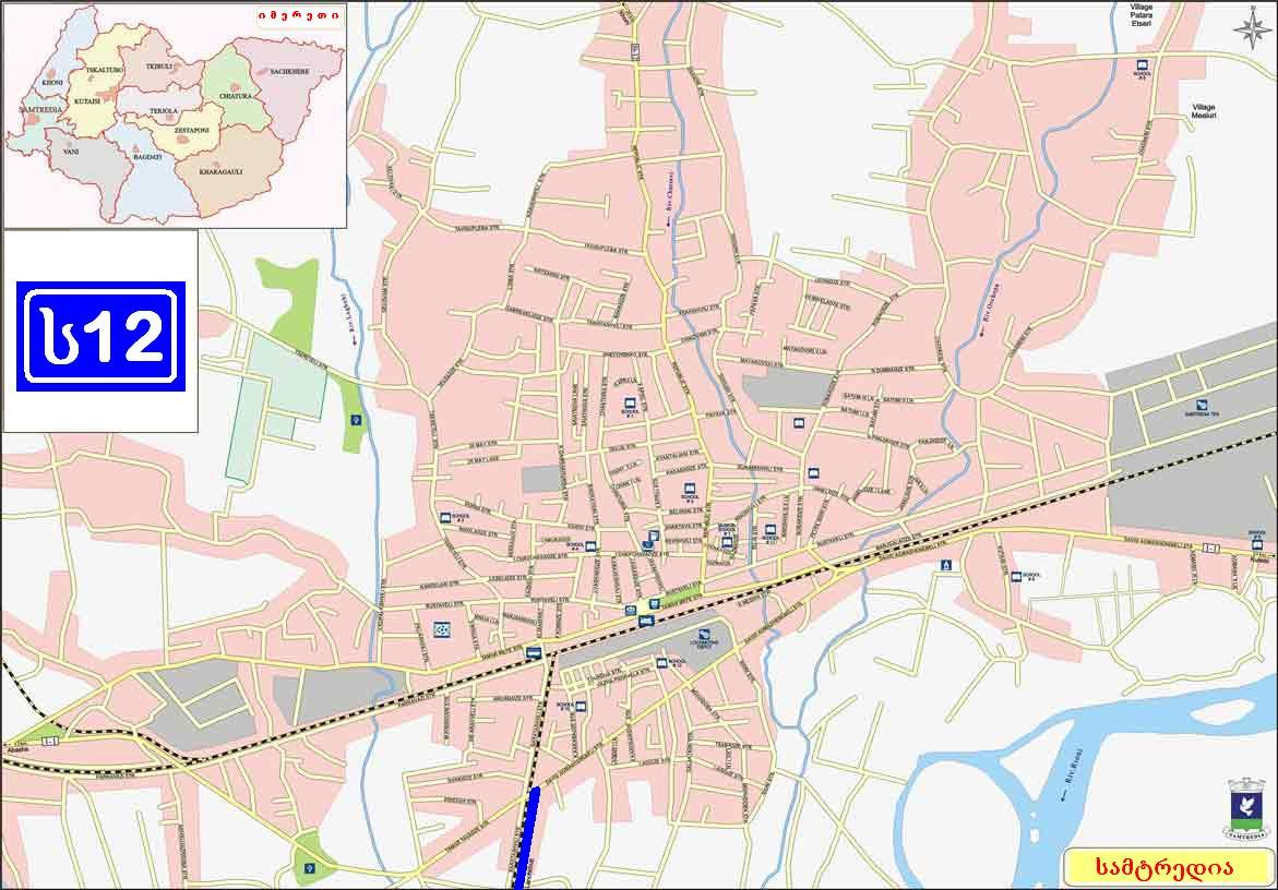 საქართველოს საავტომობილო მაგისტრალი ს12